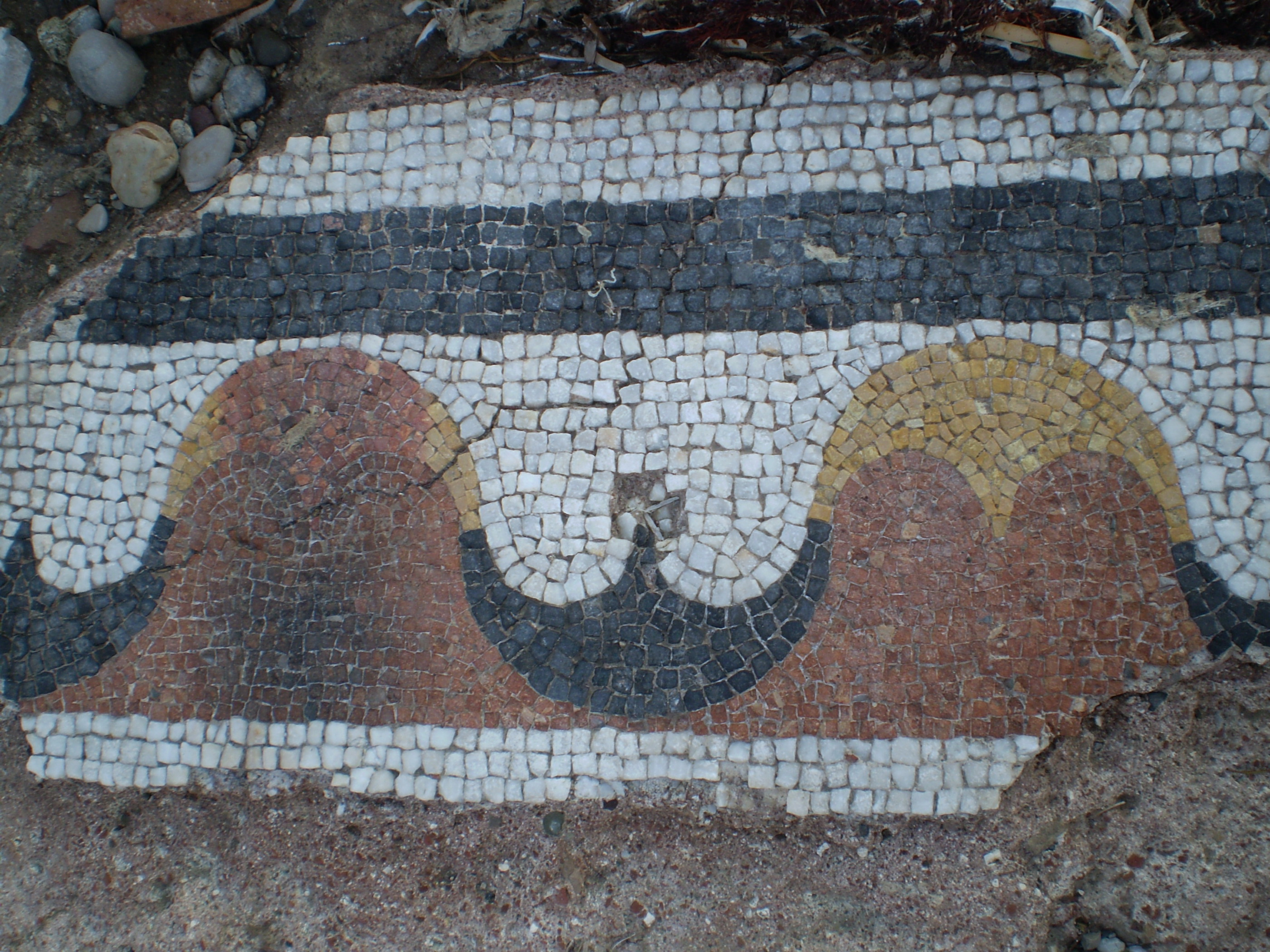 Ψηφιδωτό στα Παλιομάγαζα Αταλάντης